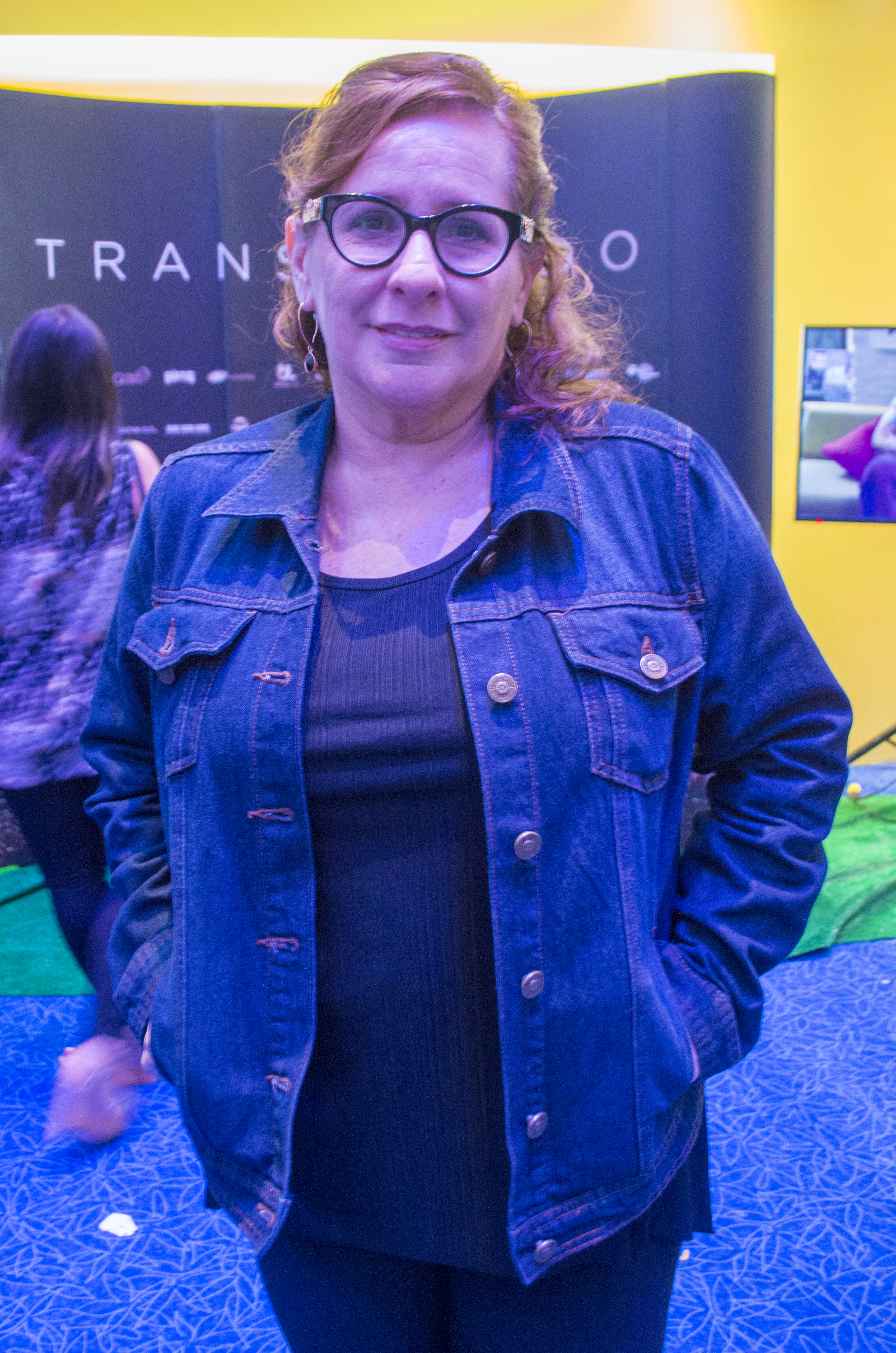 La actriz peruana radicada en Ecuador, Prisca Bustamante, en 2016.